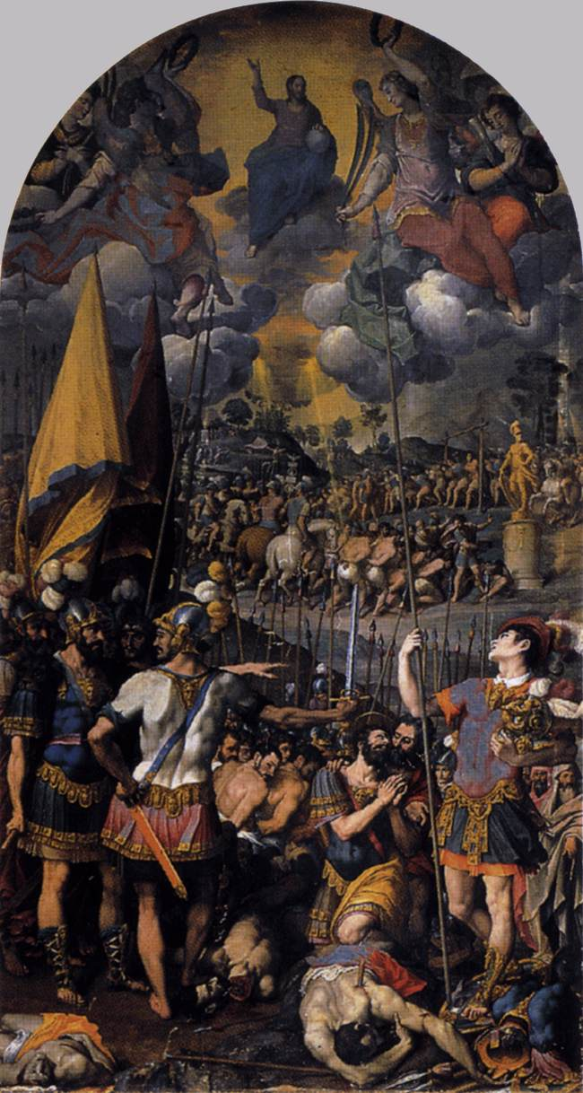 El lienzo representa el martirio de San Mauricio y de sus compañeros de la Legión tebana.